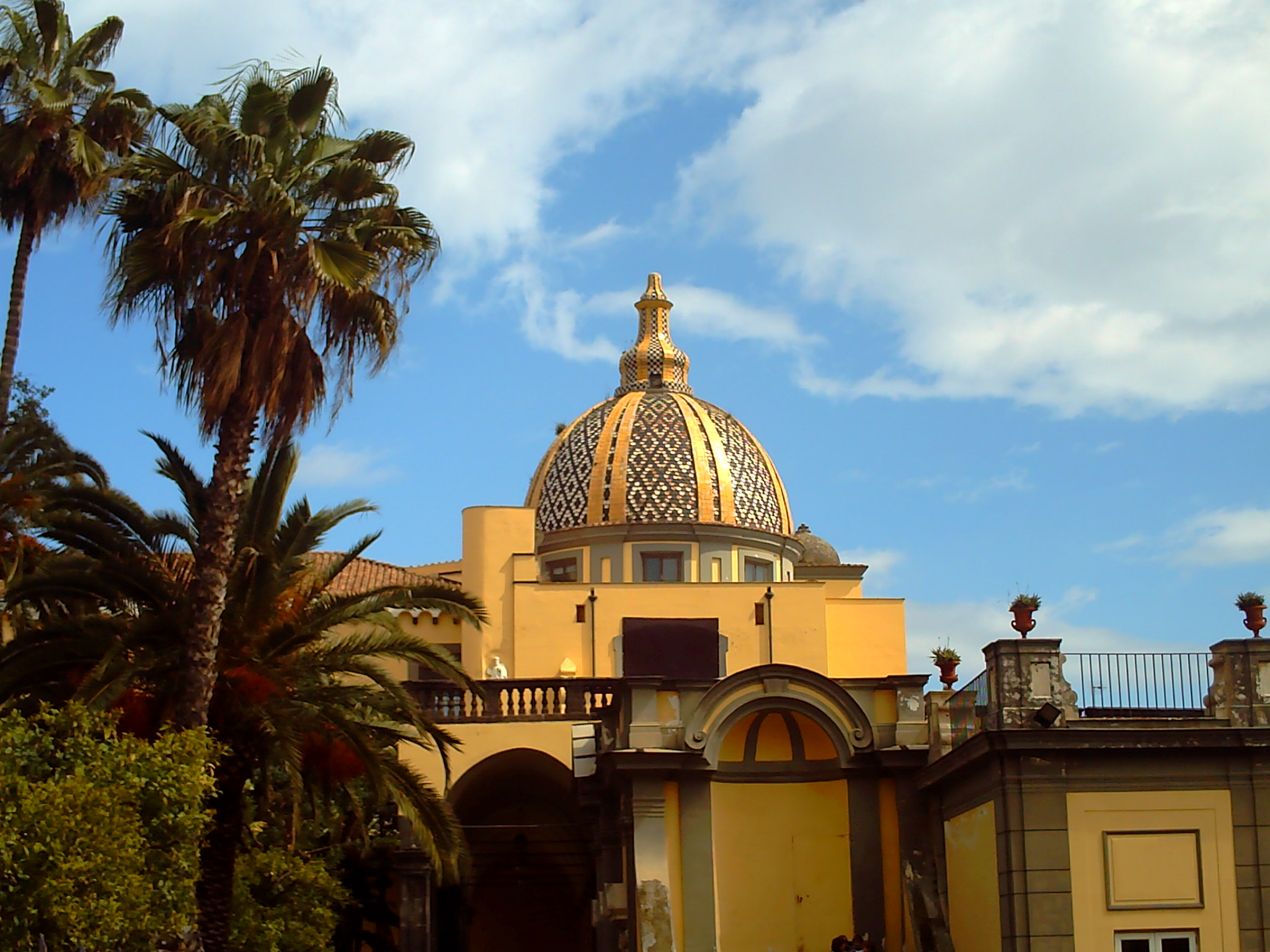 Cupola Chiesa dei Santi Marcellino e Festo (Napoli)